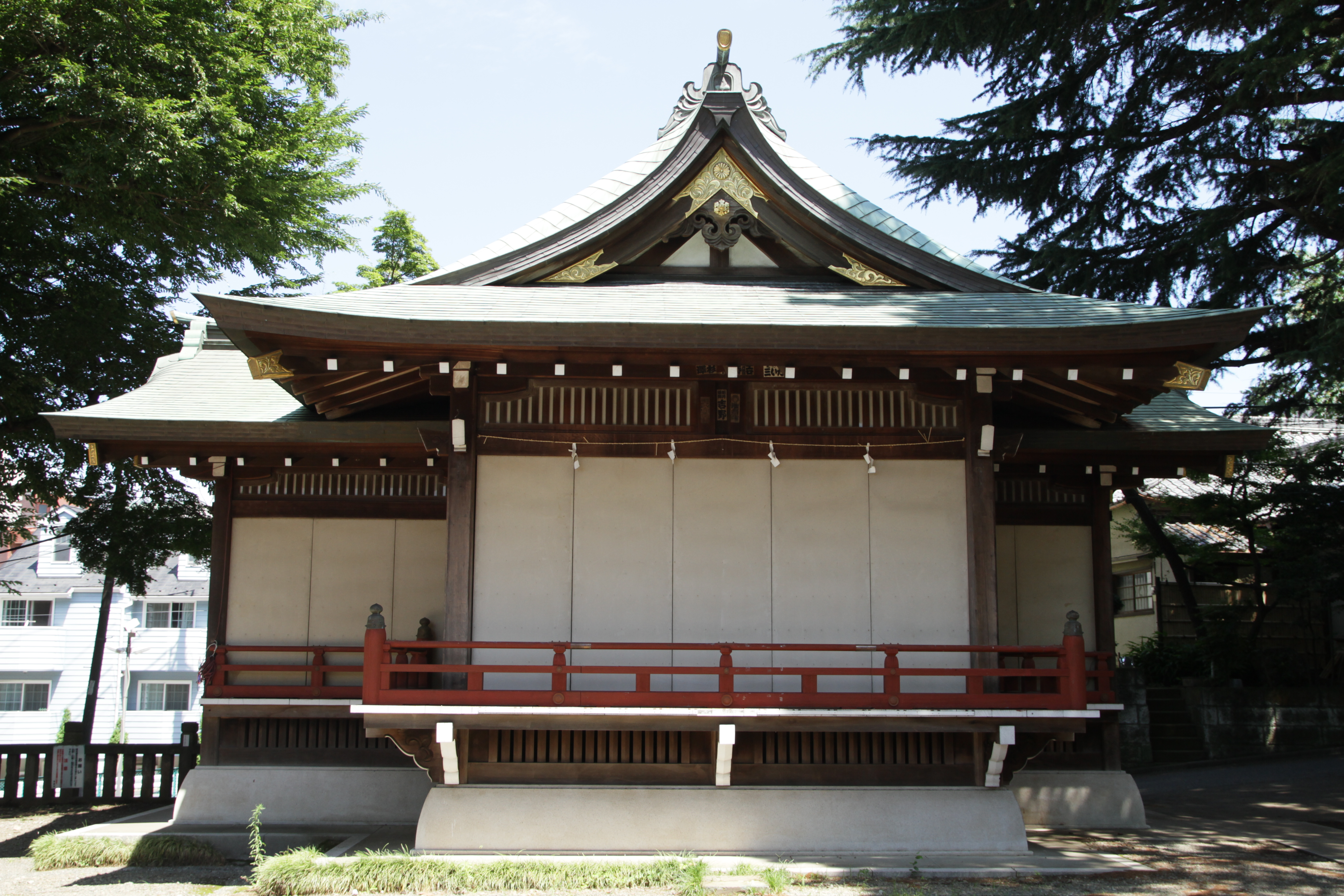 用賀神社の神楽殿